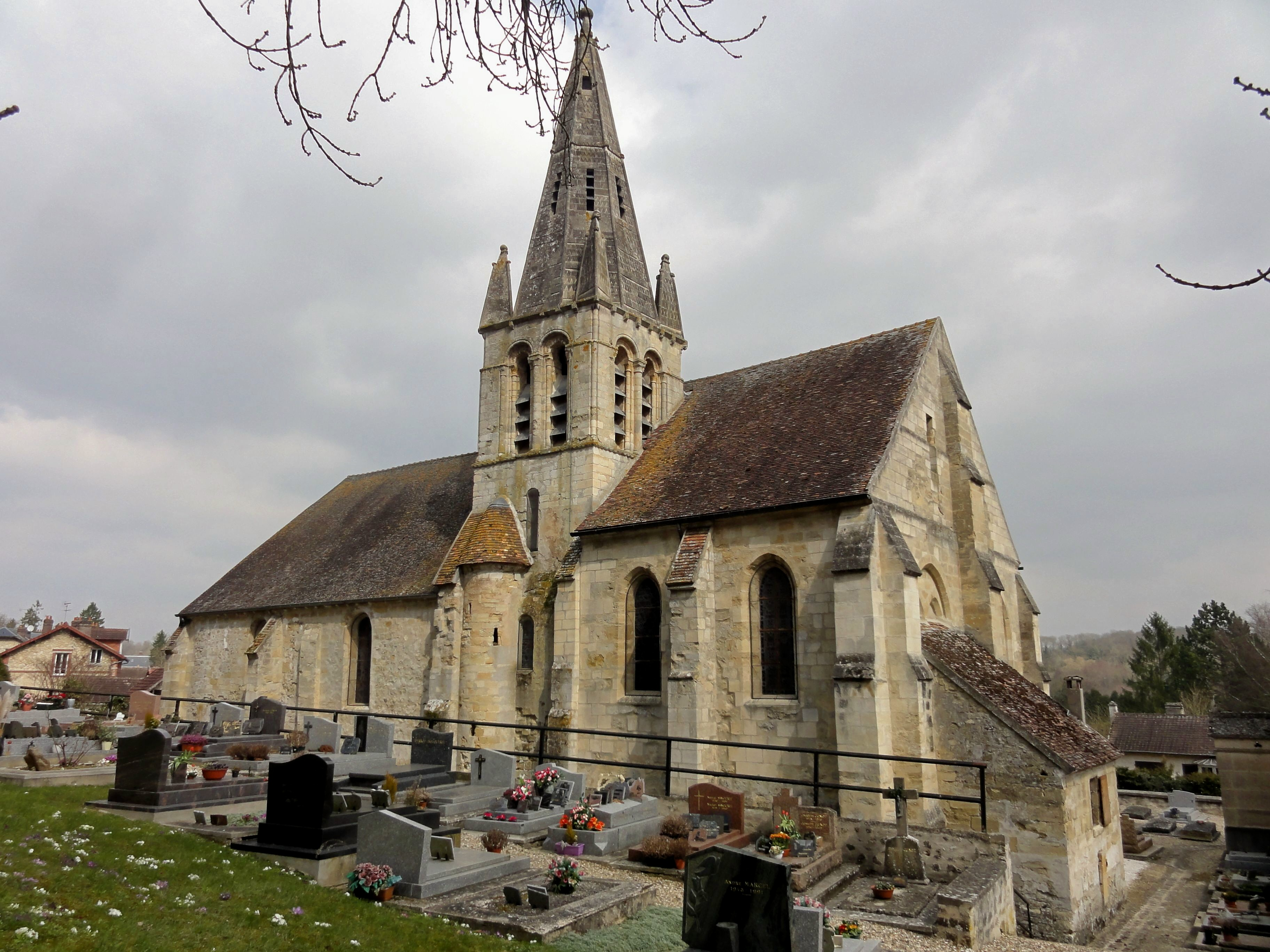 Vue depuis le sud-est.